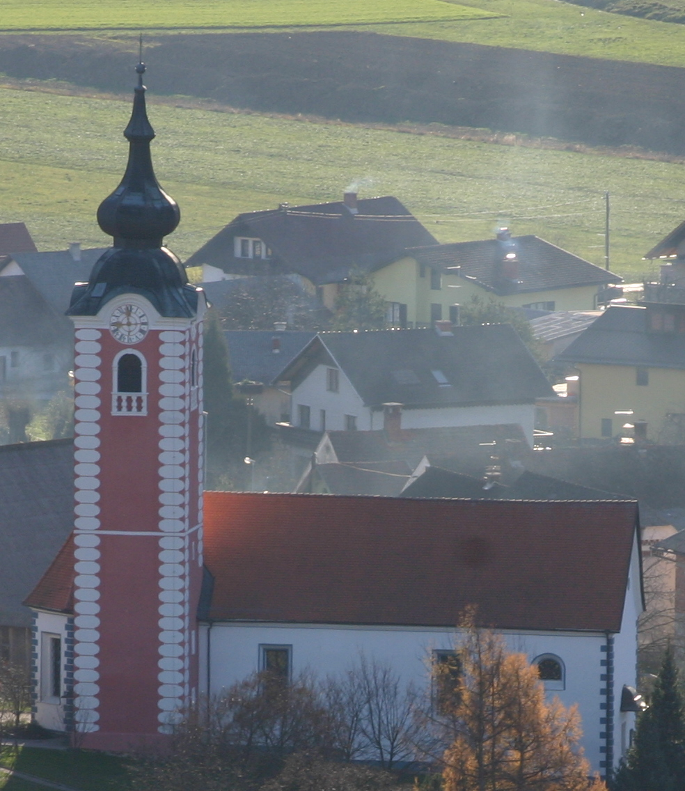 Cerkev svetega Petra v Žičah. Slikano z Žičke gorce.